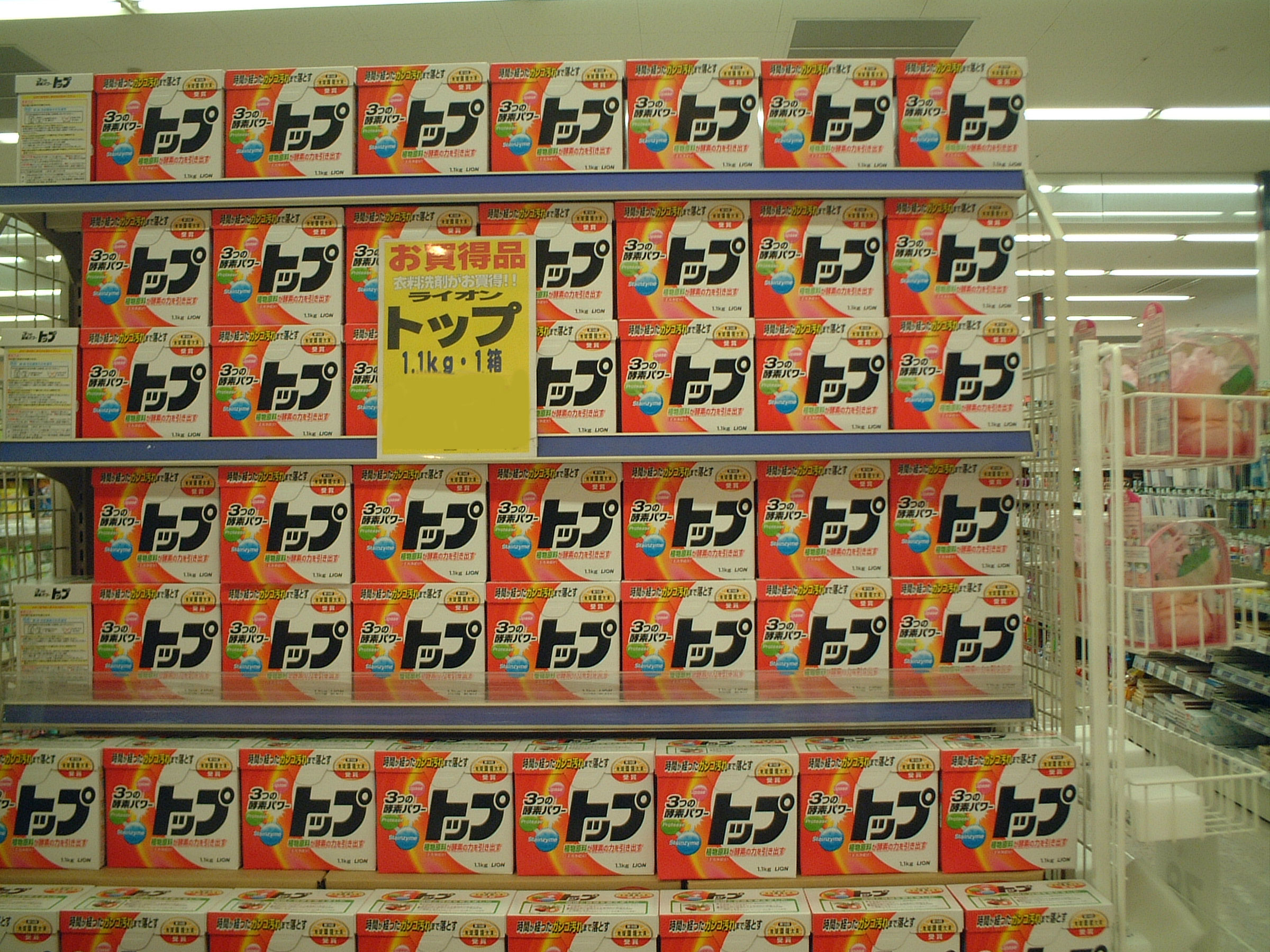 洗剤の「トップ」、スーパーマーケット内にて